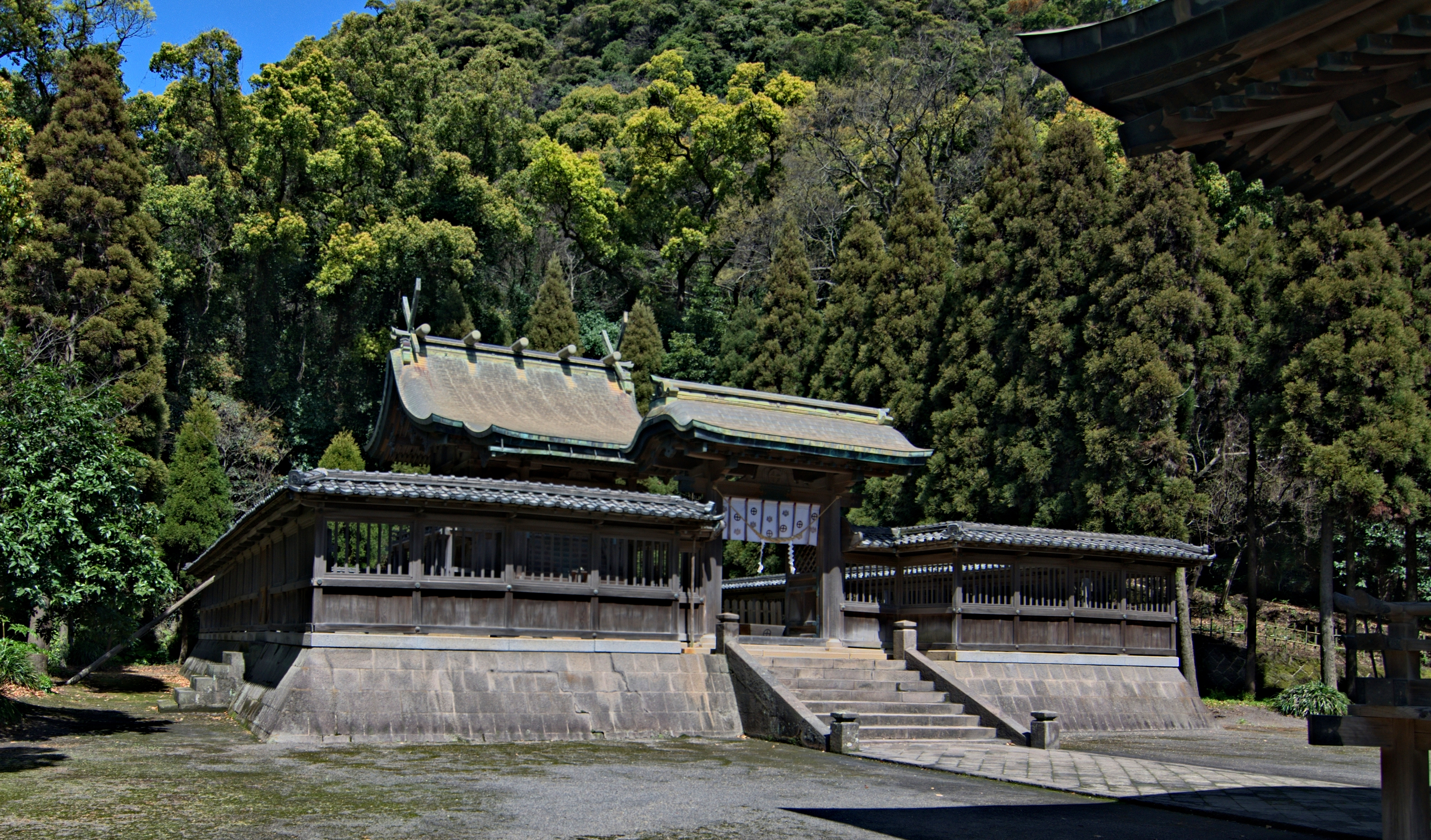 仙巌園鶴嶺神社